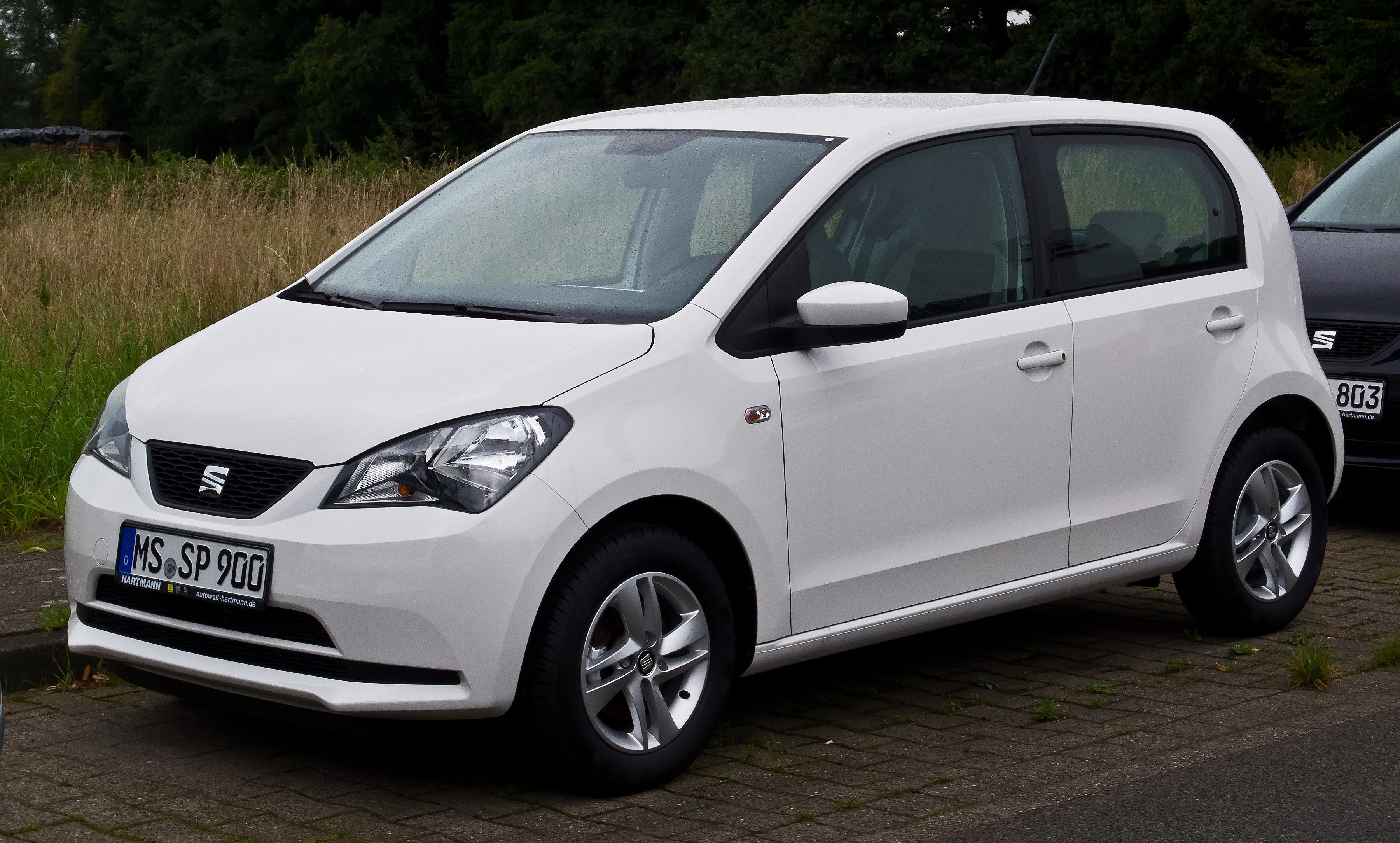 Seat Mii 1.0 Style